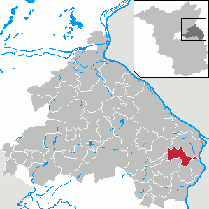 Alt Tucheband in Brandenburg (Country) - District Märkisch-Oderland